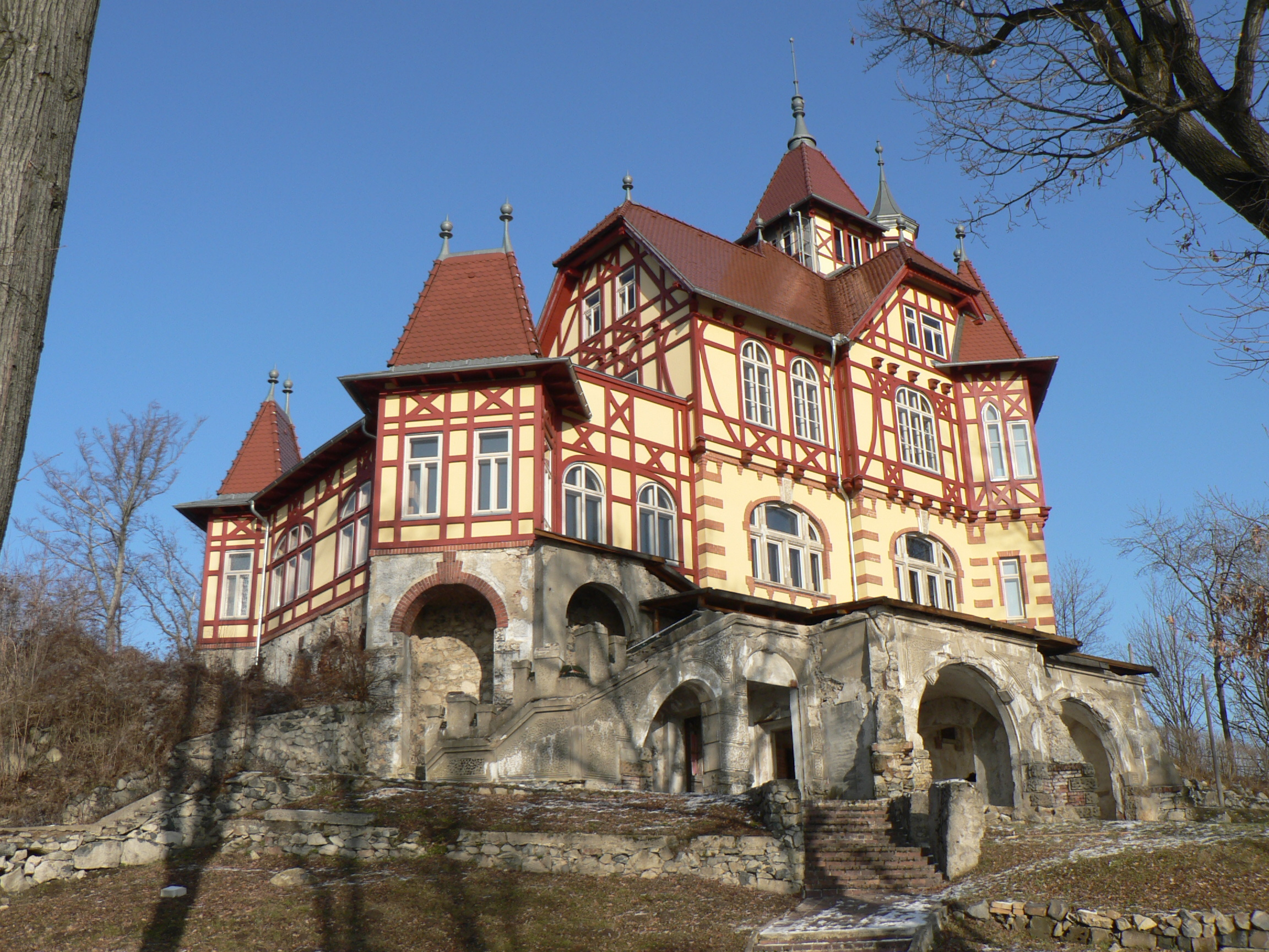 Vyhlídková výletní restaurace Hrádek, Hrádek 1726, Varnsdorf.